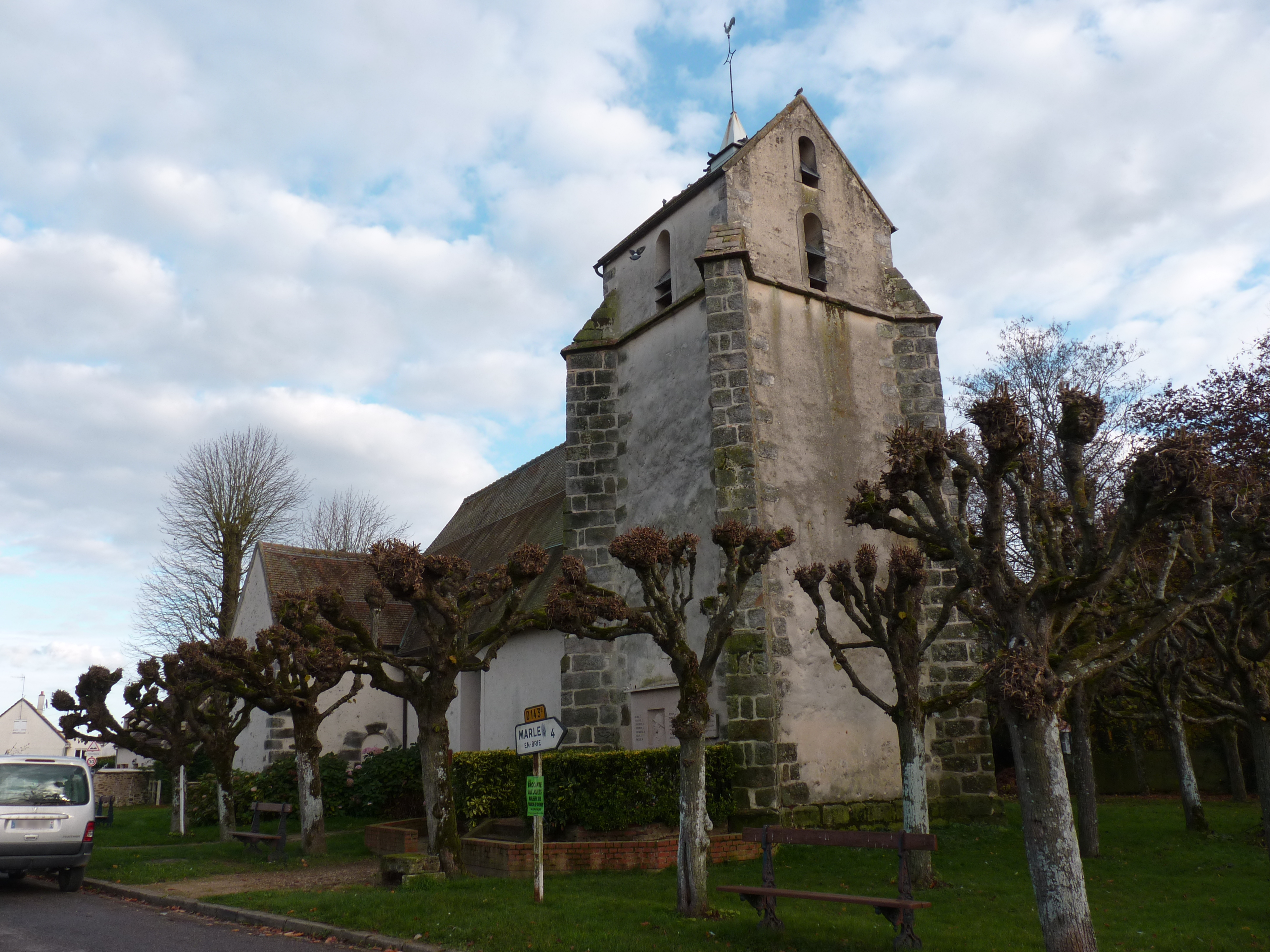 Église de Les Chapelles-Bourbon (Seine-et-Marne, région Île-de-France).